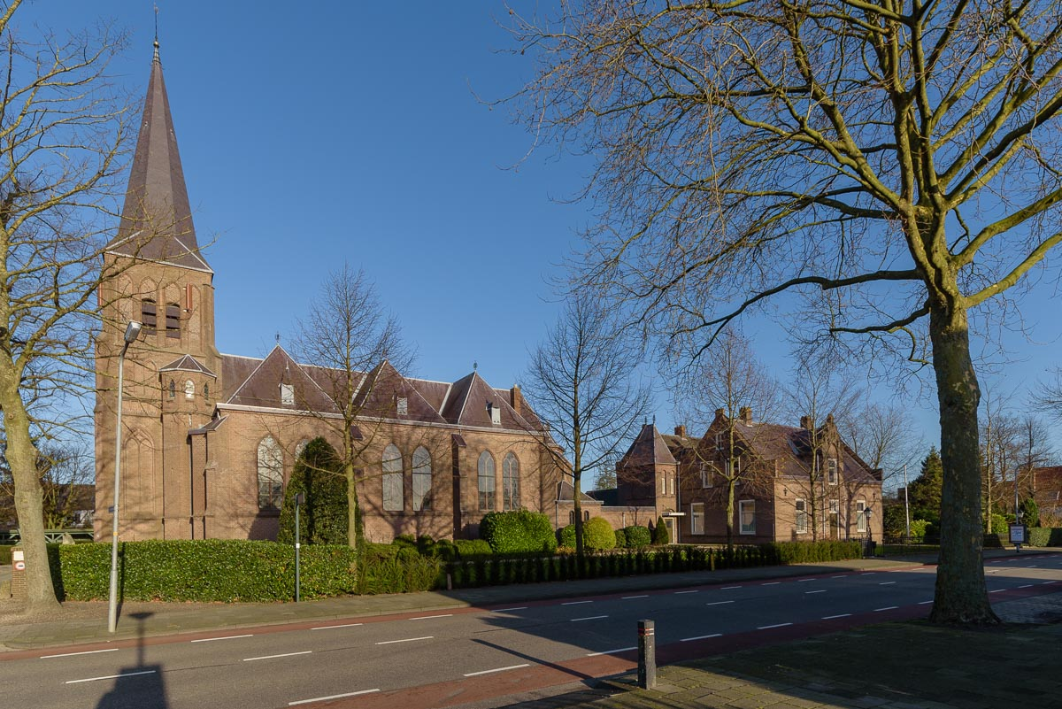 RK kerk Antonius van Padua, Kerklaan, Kortenhoef, Wijdemeren, Noord Holland, Nederland.